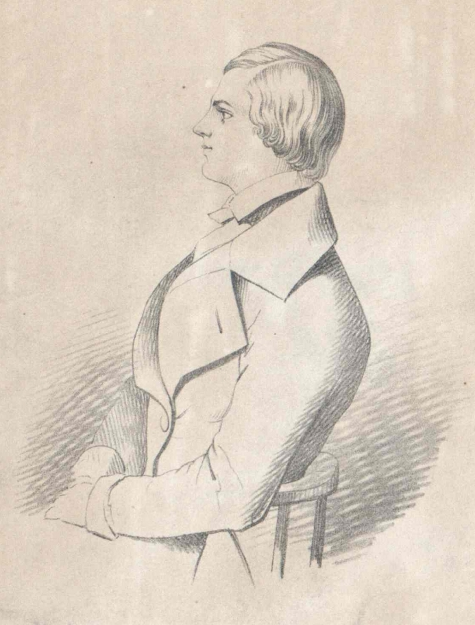 Ausschnitt aus ÖNB PORT_00146923_01: Porträt des Schauspielers Friedrich Philipp Devrient